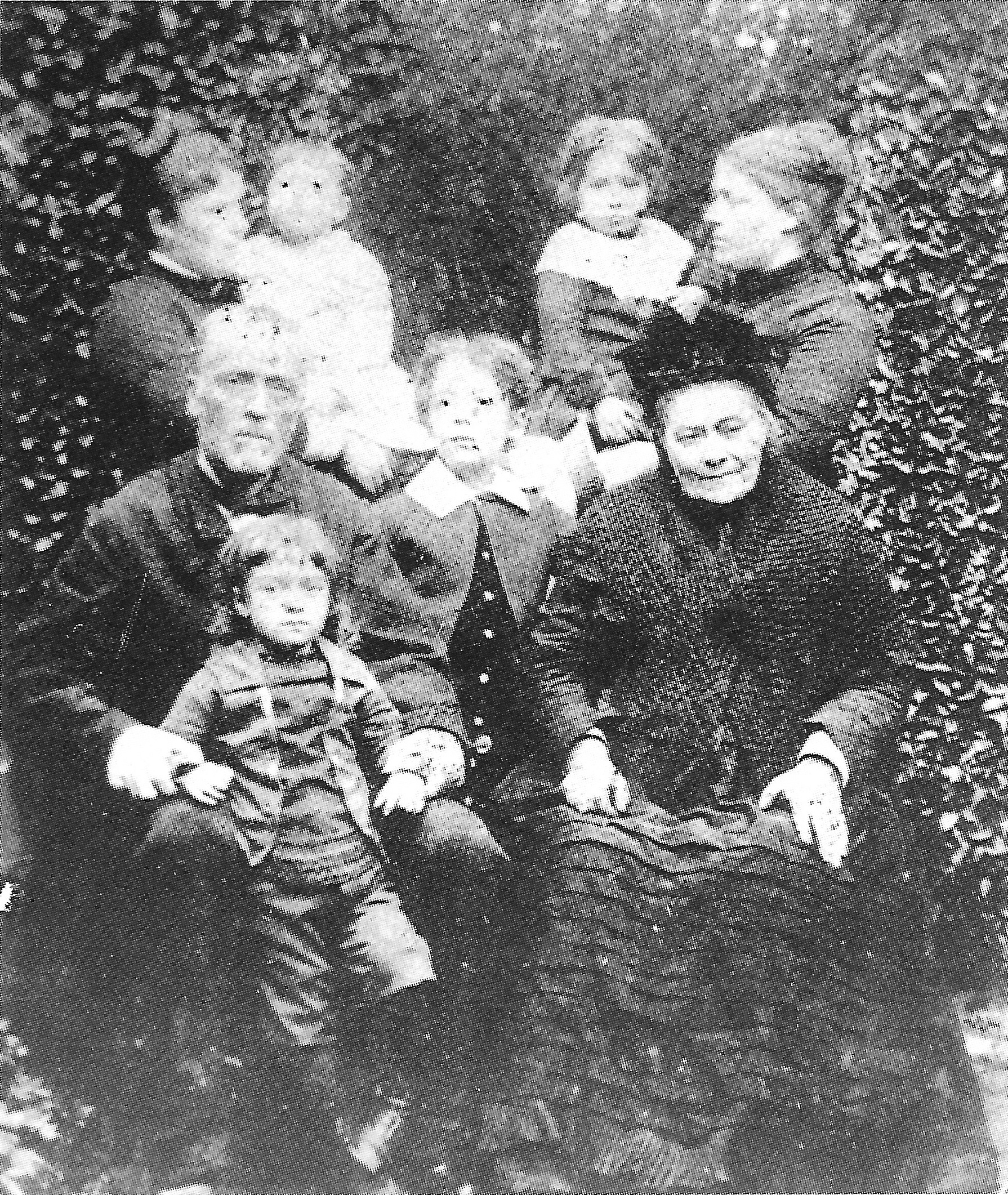 Victor Segalen vers 1887 entre ses deux grand-parents maternels, Aline et Ambroise Lalance, avec sa mère Ambroisine (à droite) tenant sa sœur Jeanne dans ses bras et sa tante Louise (à gauche) avec ses deux garçons